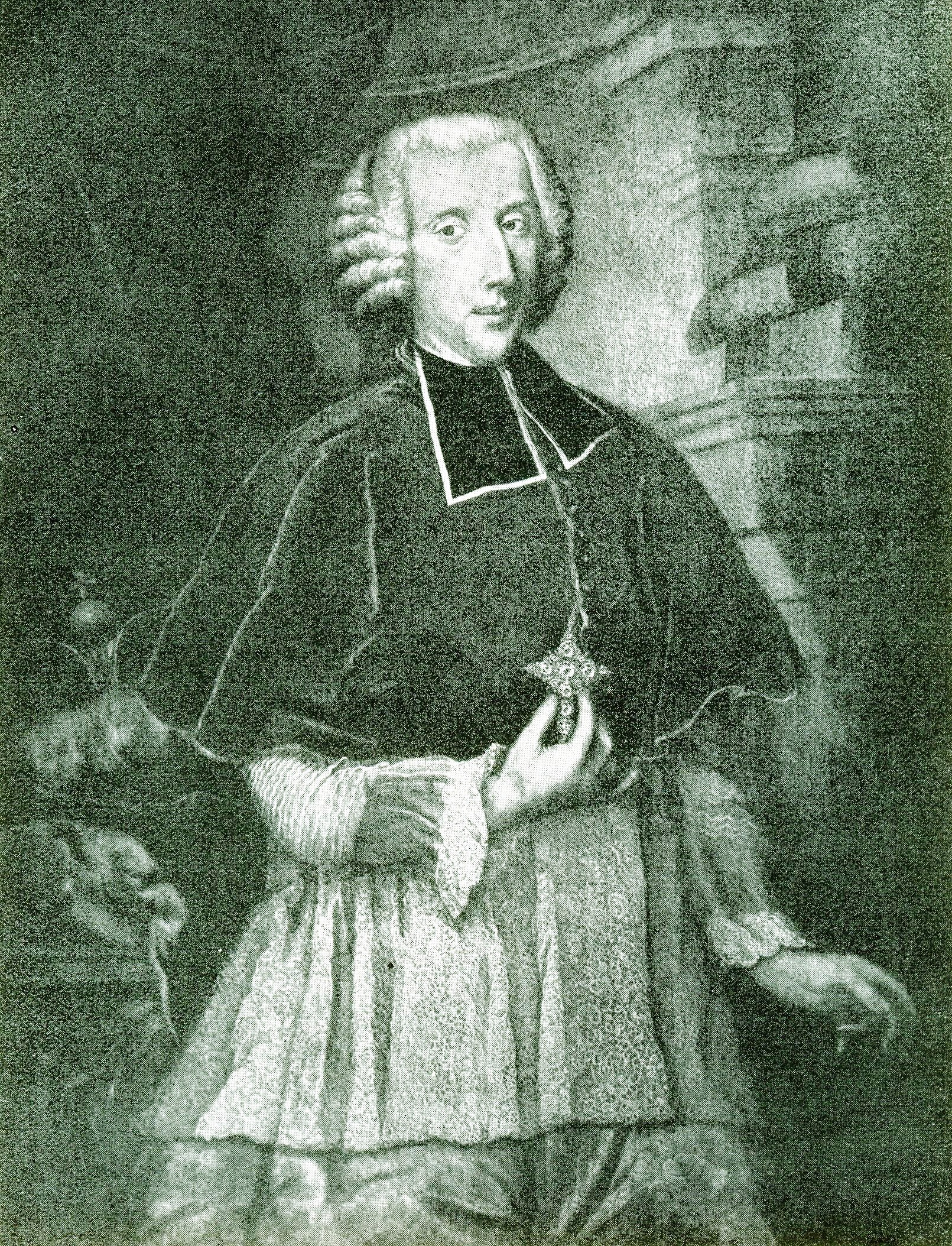 Portrait des Breslauer Bischofs Philipp Gotthard Graf von Schaffgotsch